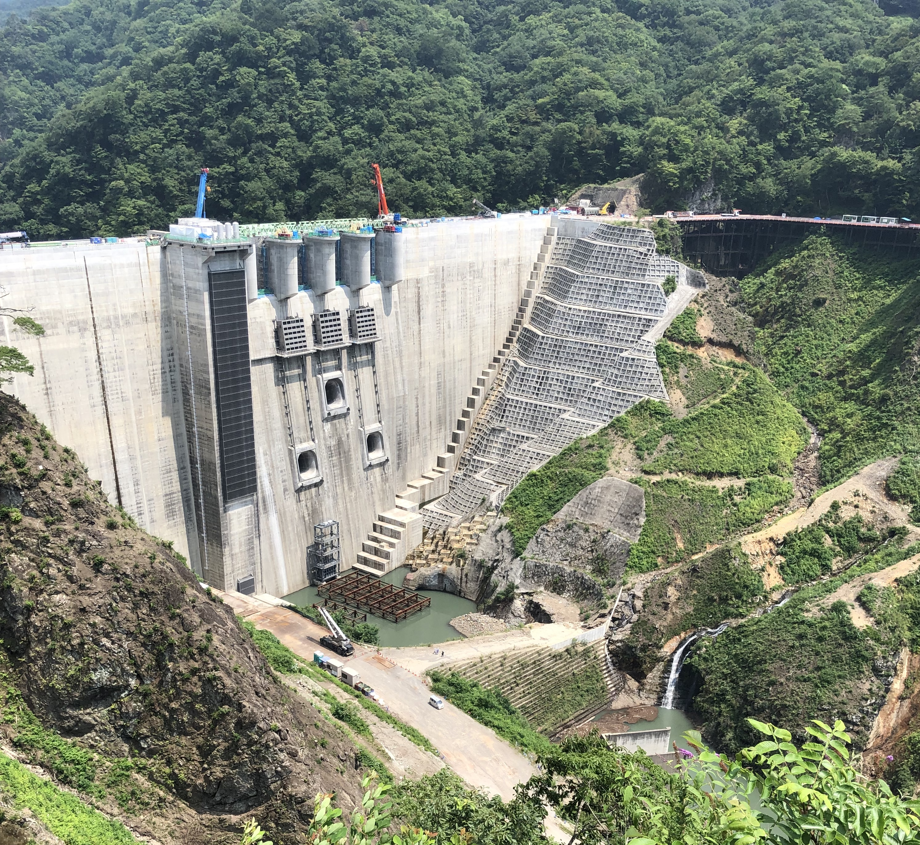 完成真近の八ッ場ダム、令和元年8月4日撮影、八ッ場ダム展望台で